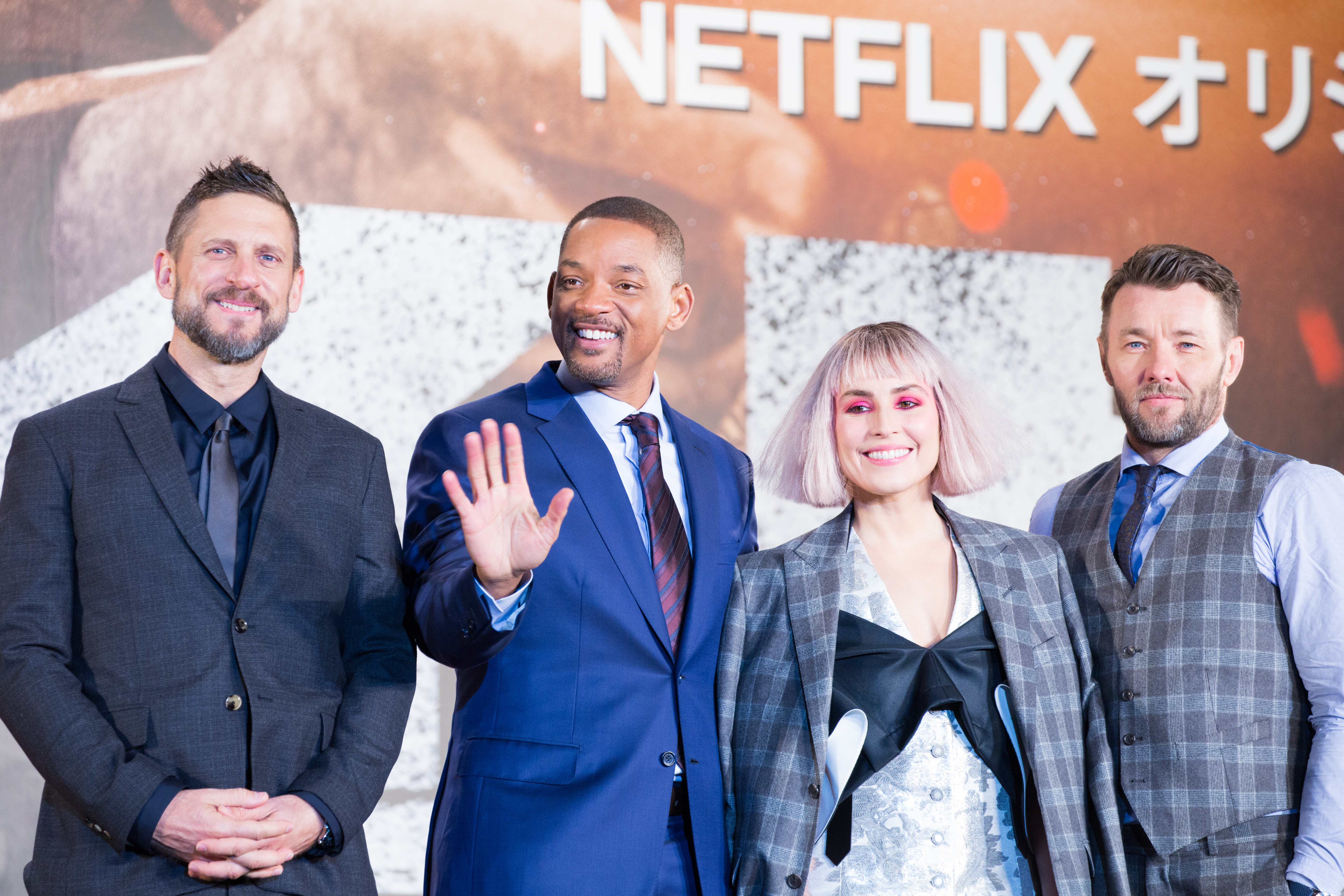 ブライト ジャパン・プレミア レッドカーペット デヴィッド・エアー ウィル・スミス ノオミ・ラパス ジョエル・エドガートン